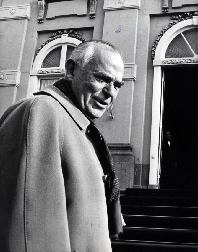 Burger, J.A.W. (SDAP / PvdA). Kabinetsformatie 1973. Formateur Burger op de trappen van Huis ten Bosch. Nederland, Den Haag, 20 maart 1973.